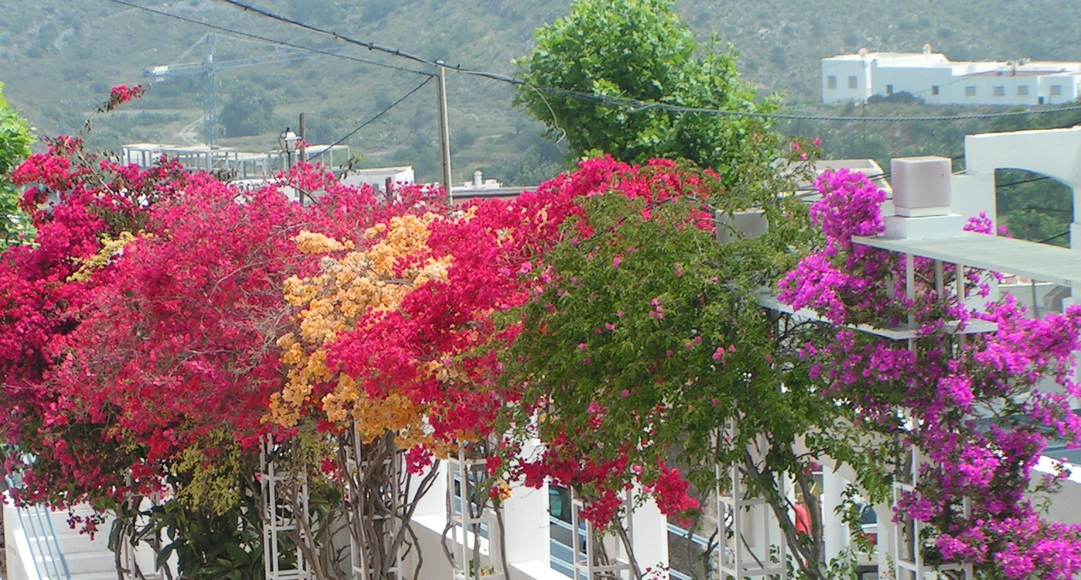 Bougainvilliers Catégorie:Nyctaginaceae